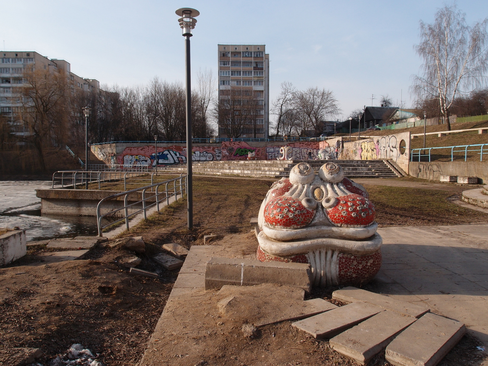 Sculptures at vulica Charkaŭskaja